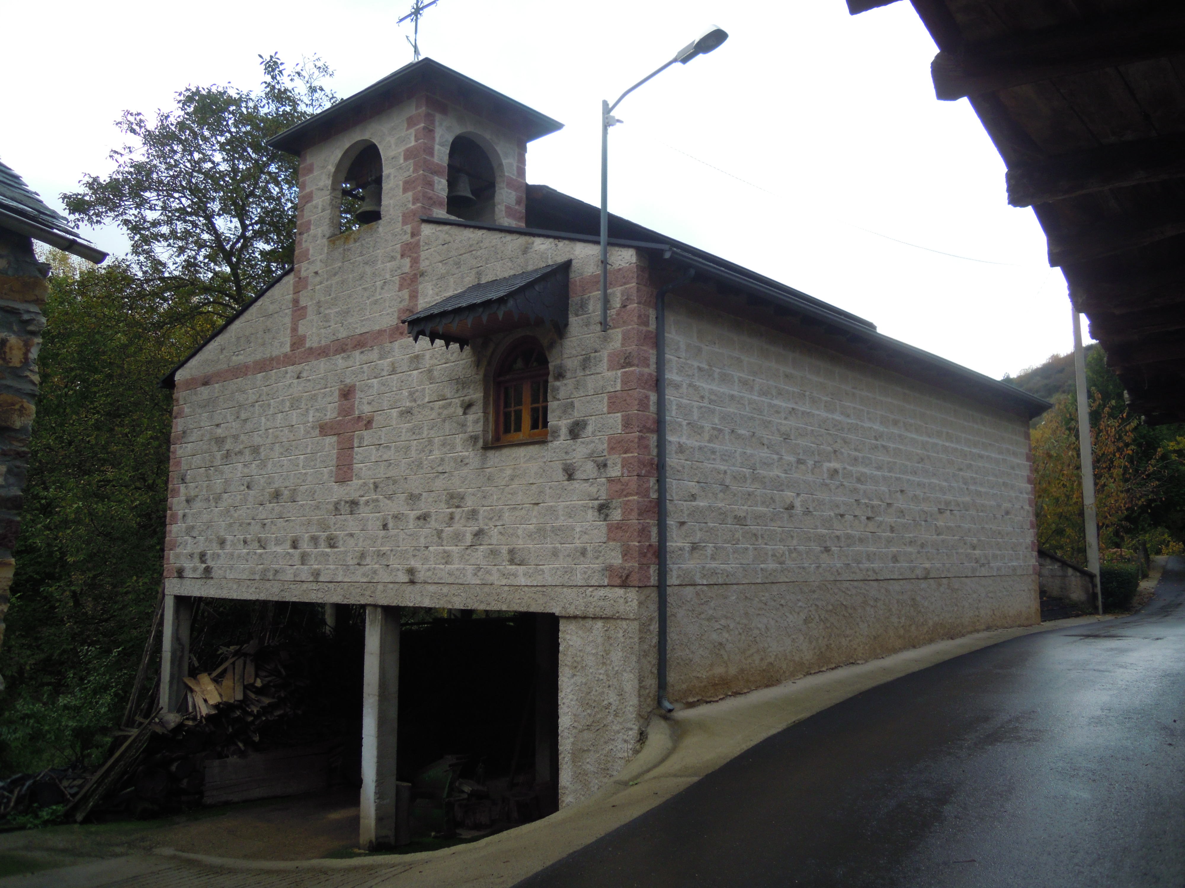 Igrexa de Santo Estevo de Pardollán (Rubiá)